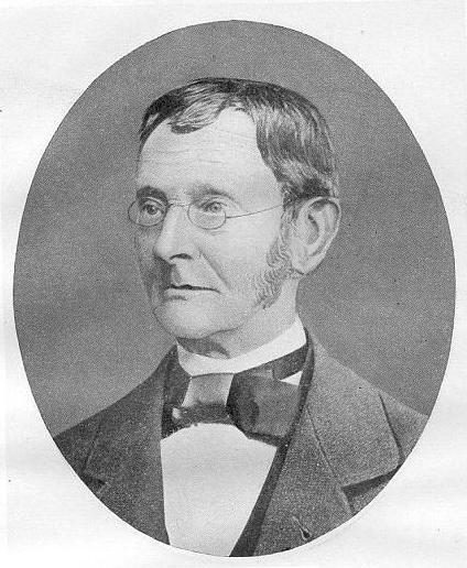 Heinrich Ludolf Ahrens (1808–1881). Fotografie aus dem Besitz von Wilhelm Capelle (1871–1961).